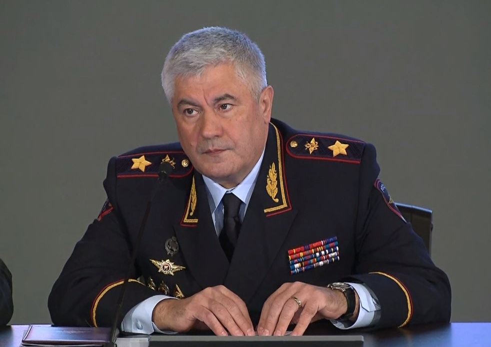 Министр внутренних дел РФ Владимир Колокольцев на расширенном заседании Коллегии МВД, 15 марта 2016 года.